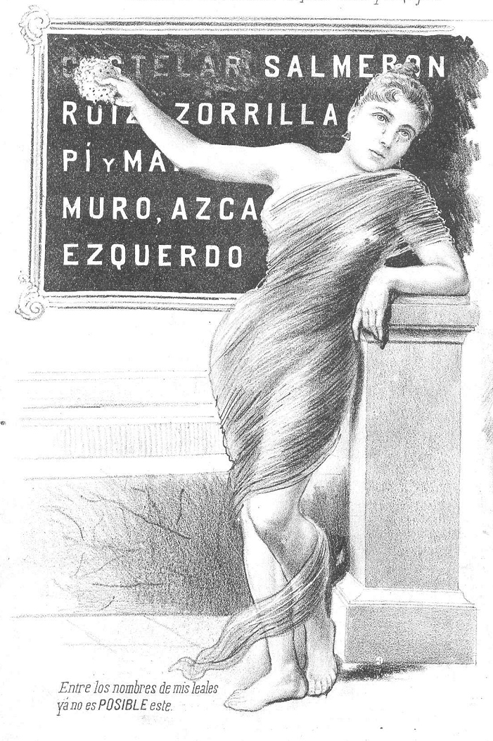 Ilustración en la revista satírica española Don Quijote.